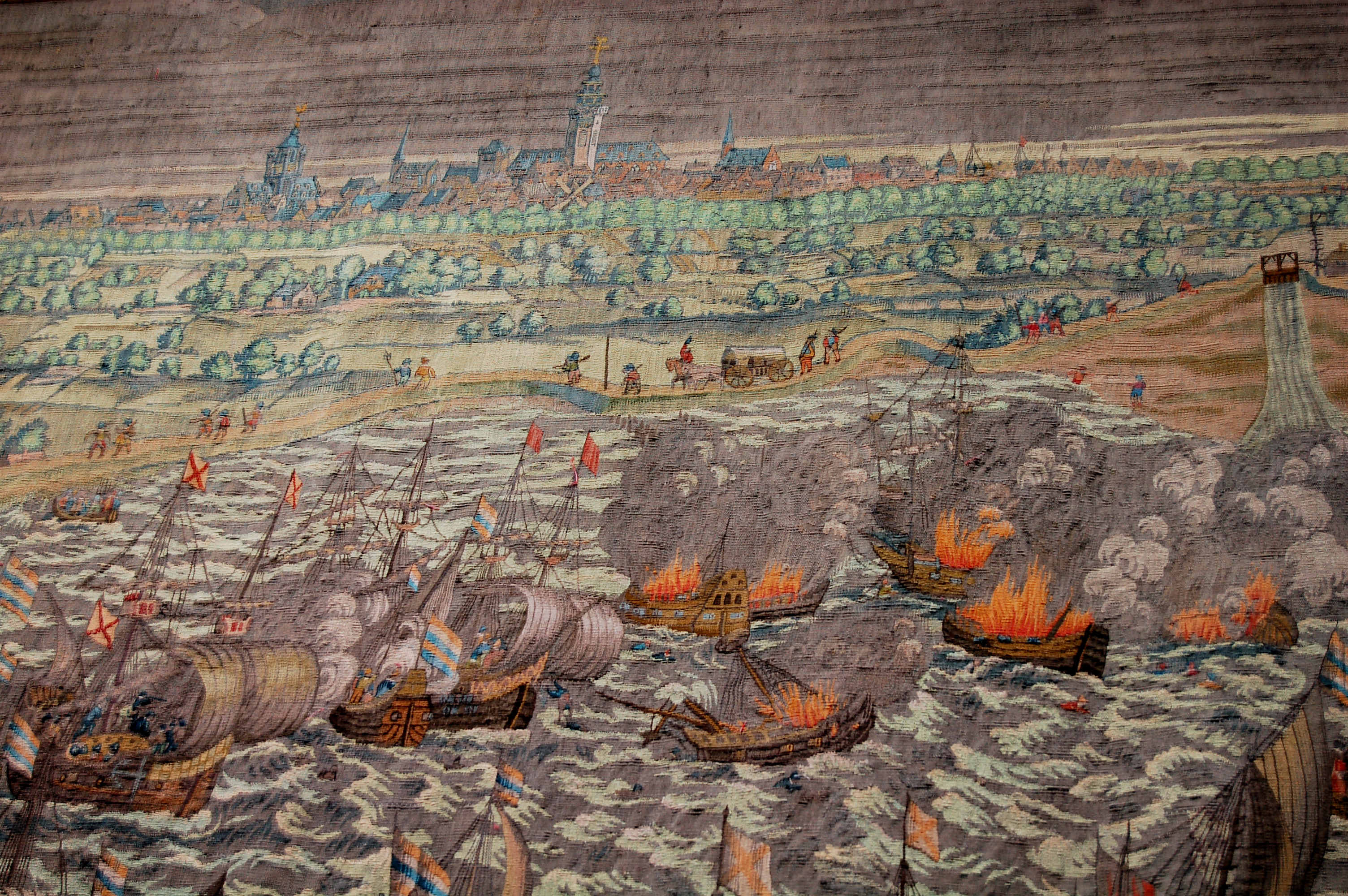 Wandtapijt De slag bij Rammekens, Hendrick de Maecht, april 1573 Wandtapijt Slag bij Rammekens, Hendrick de Maecht, april 1573